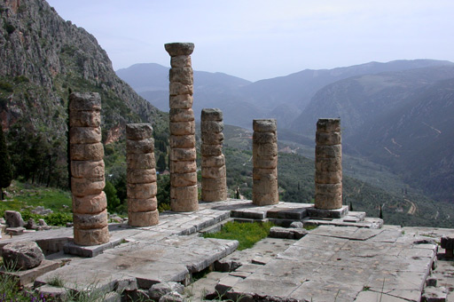 Tempio di Apollo a Delfi in Grecia.